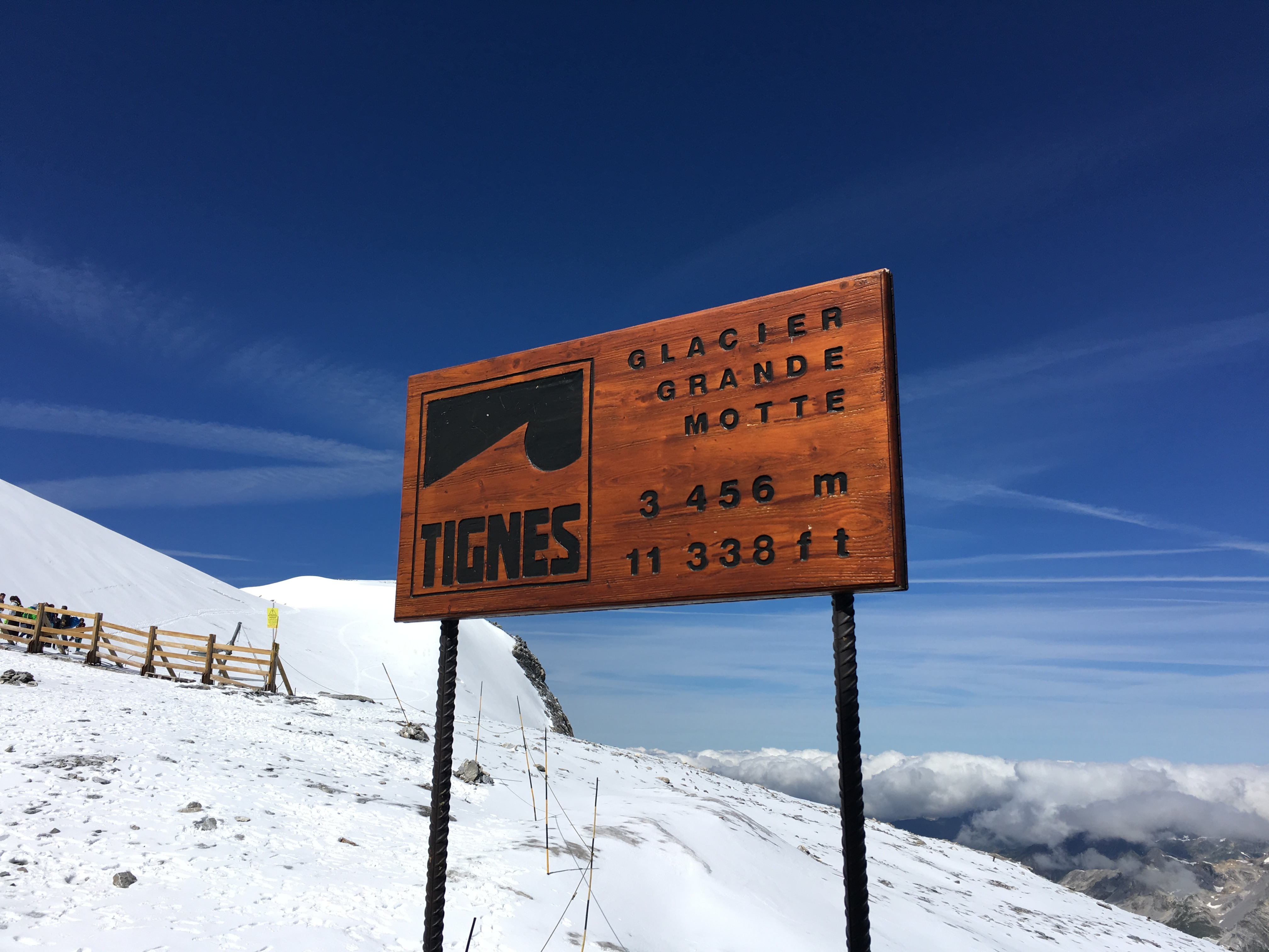 Panneau présent à l'arrivée du téléphérique